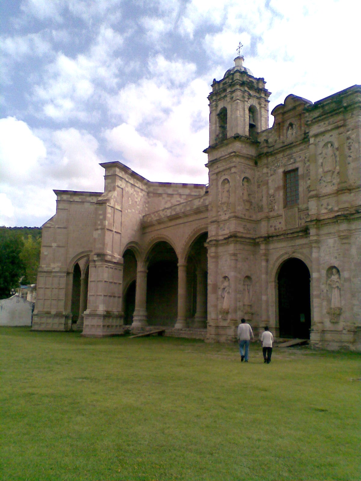 Foto del Convento de San Pedro y San Pablo Teposcolula